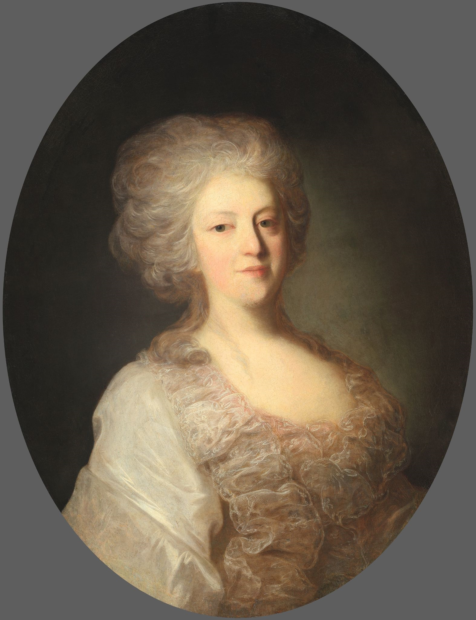 Прасковья Николаевна Ланская (ур. Долгорукова, в первом браке Лачинова), жена Я.Д. Ланского.